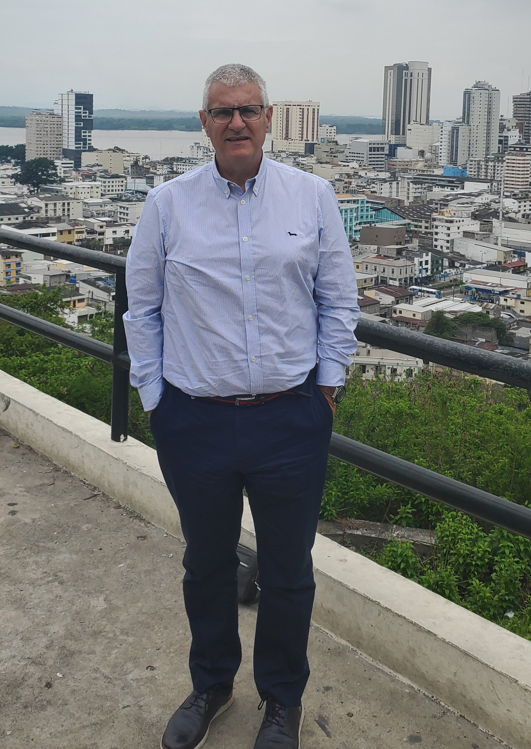 Antonio Cordón, director de deportivo de la FEF, visitó la ciudad de Guayaquil y aprovechó para conocer el Cerro del Carmen, lugar icónico de la ciudad